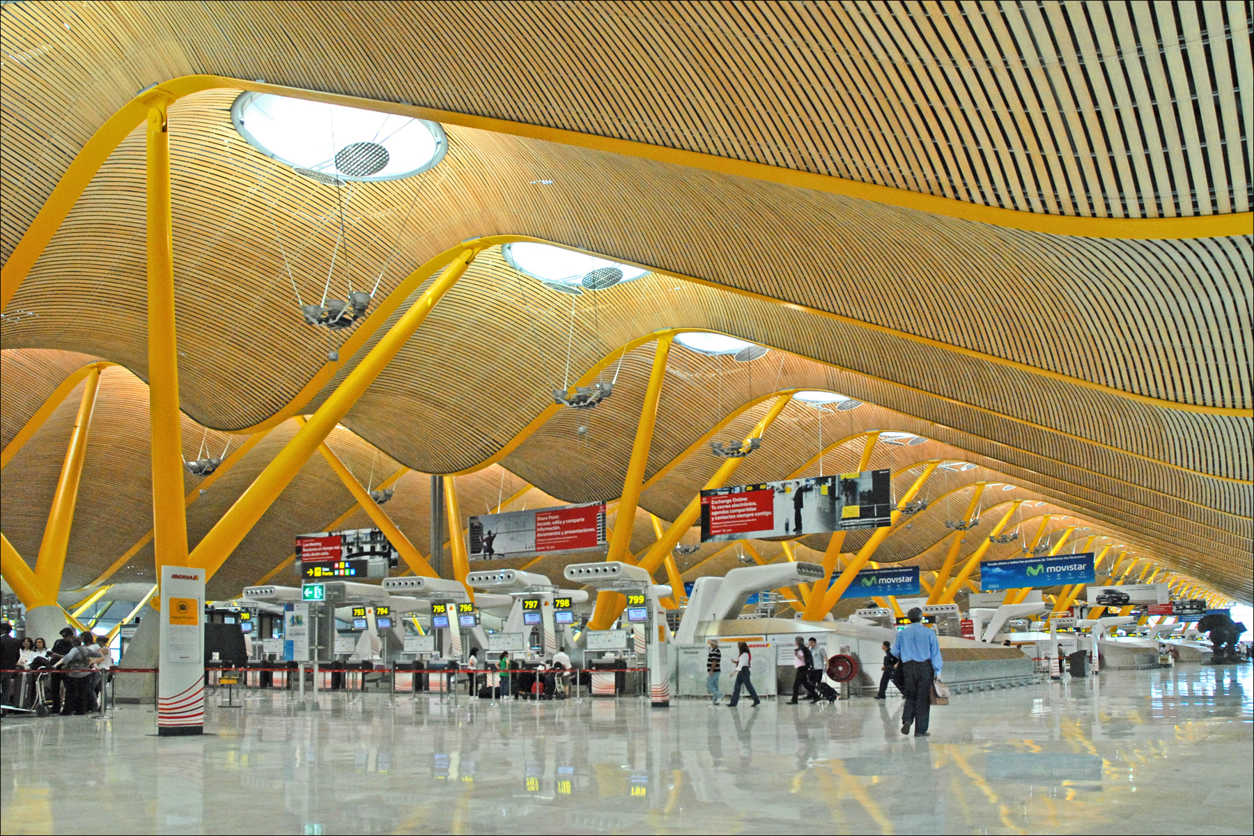 Barajas Airport in Madrid, was designed by Richard Rogers Partnership. Voir aussi l'album de l'exposition Richard Rogers + architectes au Centre G. Pompidou à Paris en 2007. voir aussi la présentation du terminal T4 et T4S sur Mimoa Barajas